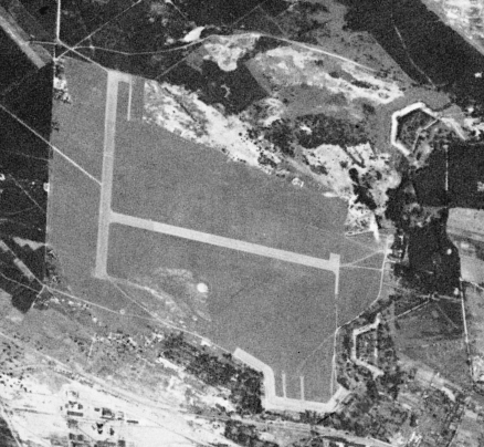 Lotnisko w Toruniu (EPTO) sfotografowane przez amerykańskiego satelitę wywiadowczego Corona 98 (KH-4A 1023) w dniu 23 sierpnia 1965 r. Widoczny również Fort VII i VIII.